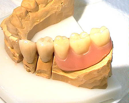 Freiendprothese, Zahnprothese